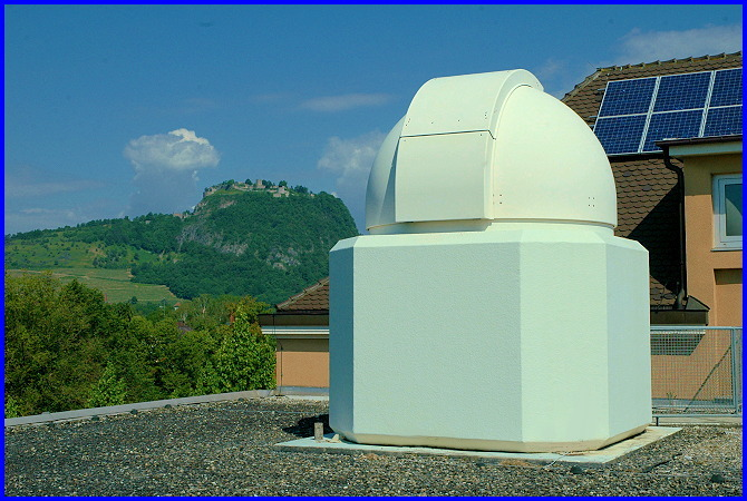 Kuppelgebäude der Sternwarte Singen im Hintergrund Blick auf den Hohentwiel